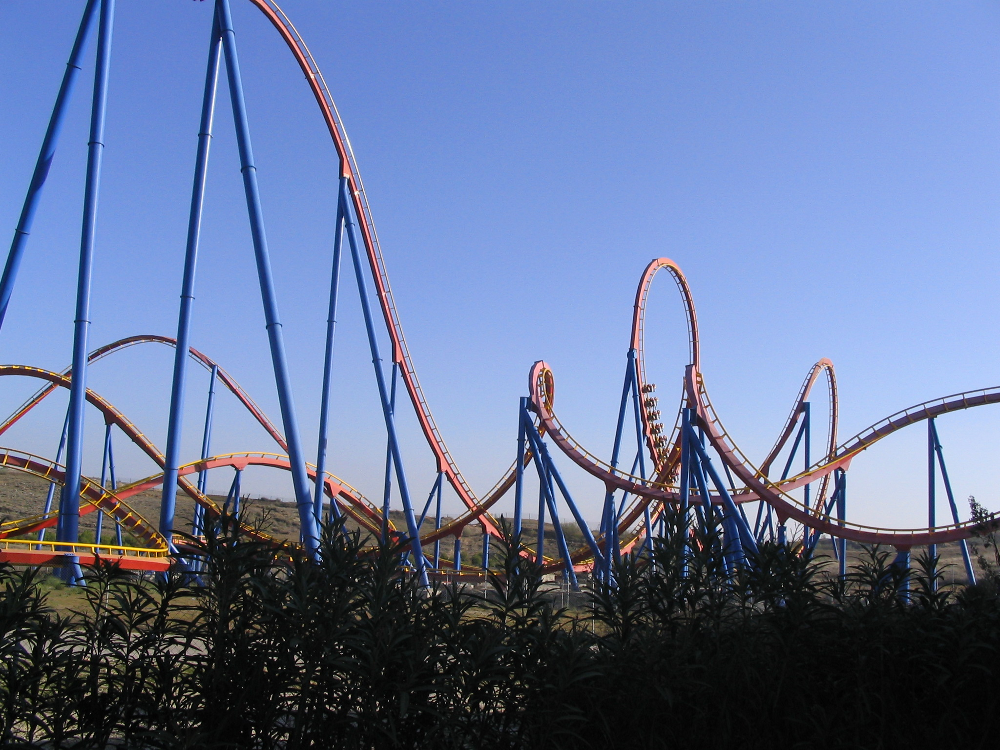 Montaña rusa de Superman, una atracción ubicada en el Parque Warner (Madrid, España).